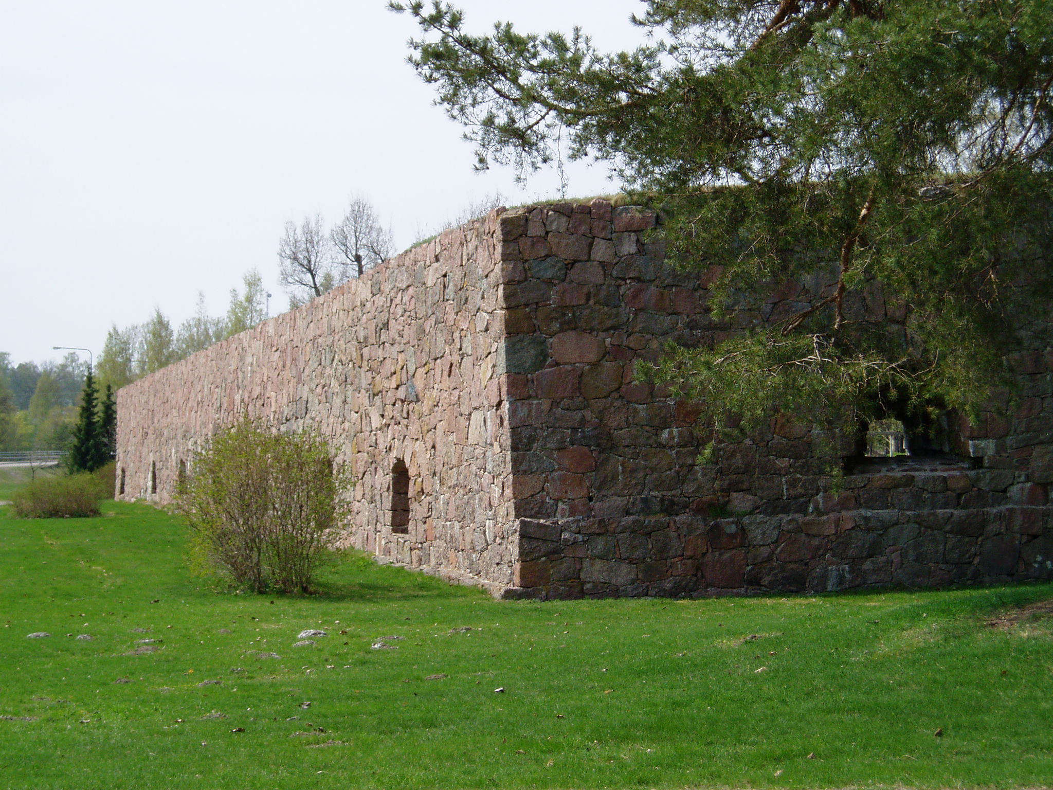 Loviisan linnoituksen etuvarustuksiin kuuluneen bastioni Ungernin kärki. Foto: Ohto Kokko